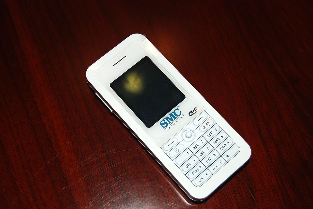 skype phone